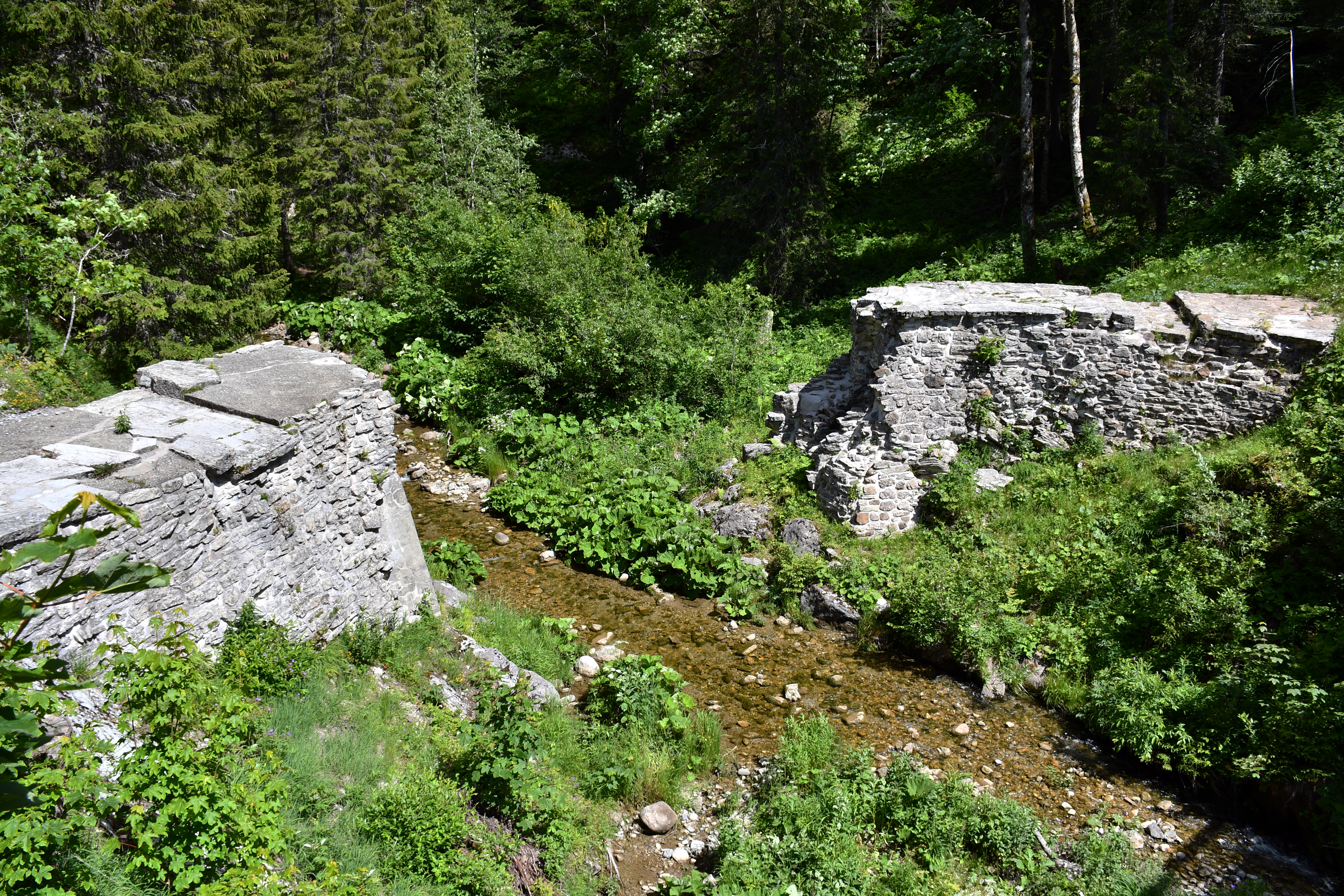 Les vestiges de l'ancien barrage-écluse de la Joux Verte, datant du XVIIe siècle, situé sur l'Eau Froide, rivière qui sépare les communes de Villeneuve (à gauche) et de Corbeyrier (à droite), dans le canton de Vaud, en Suisse.